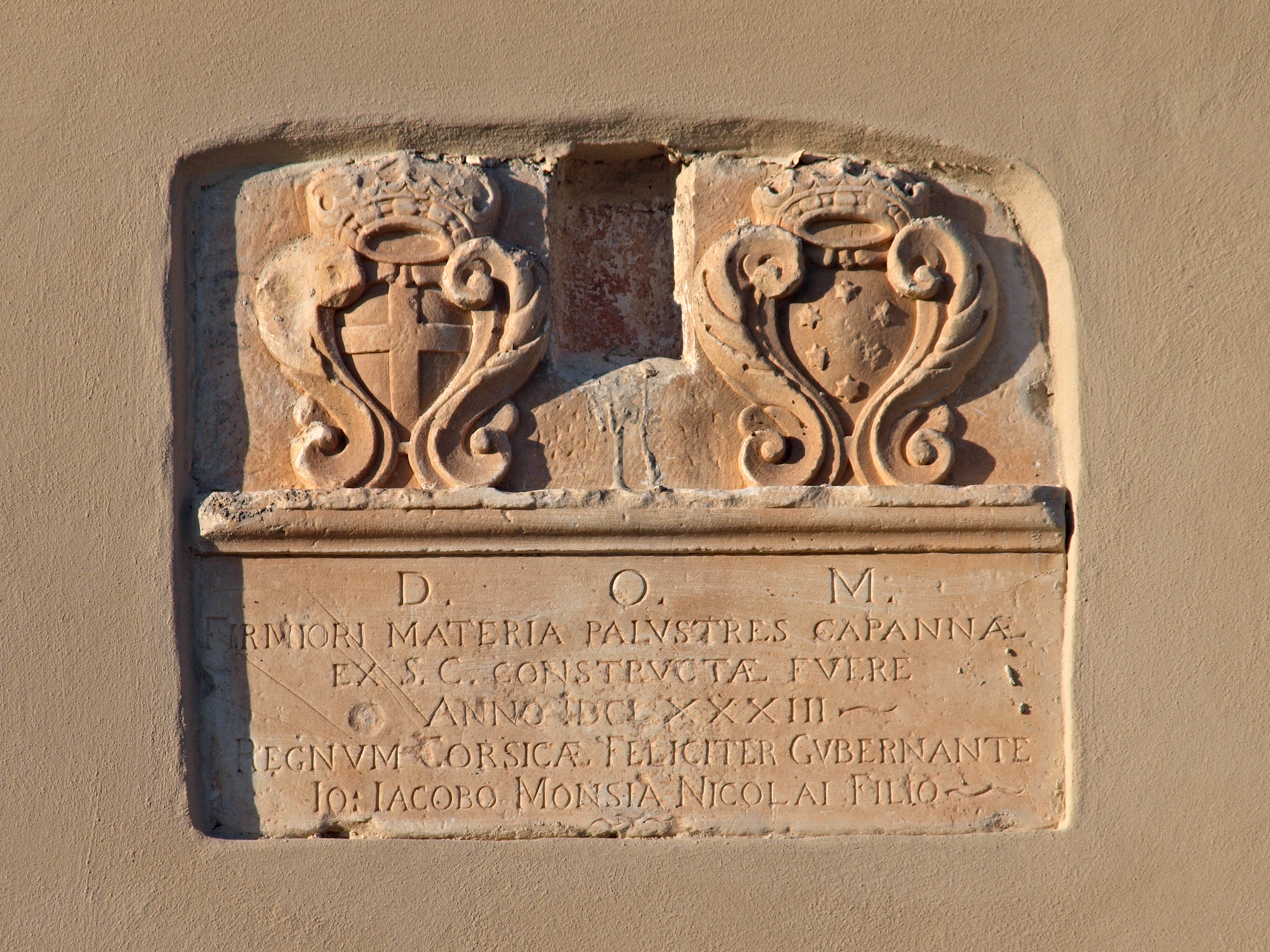 Fortin de Biguglia - Plaque murale